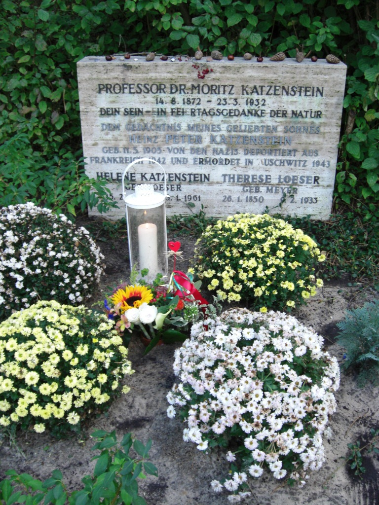 Grab des deutschen Chirurgen Moritz Katzenstein (1872-1932) in Berlin-Westend, Friedhof Heerstraße.